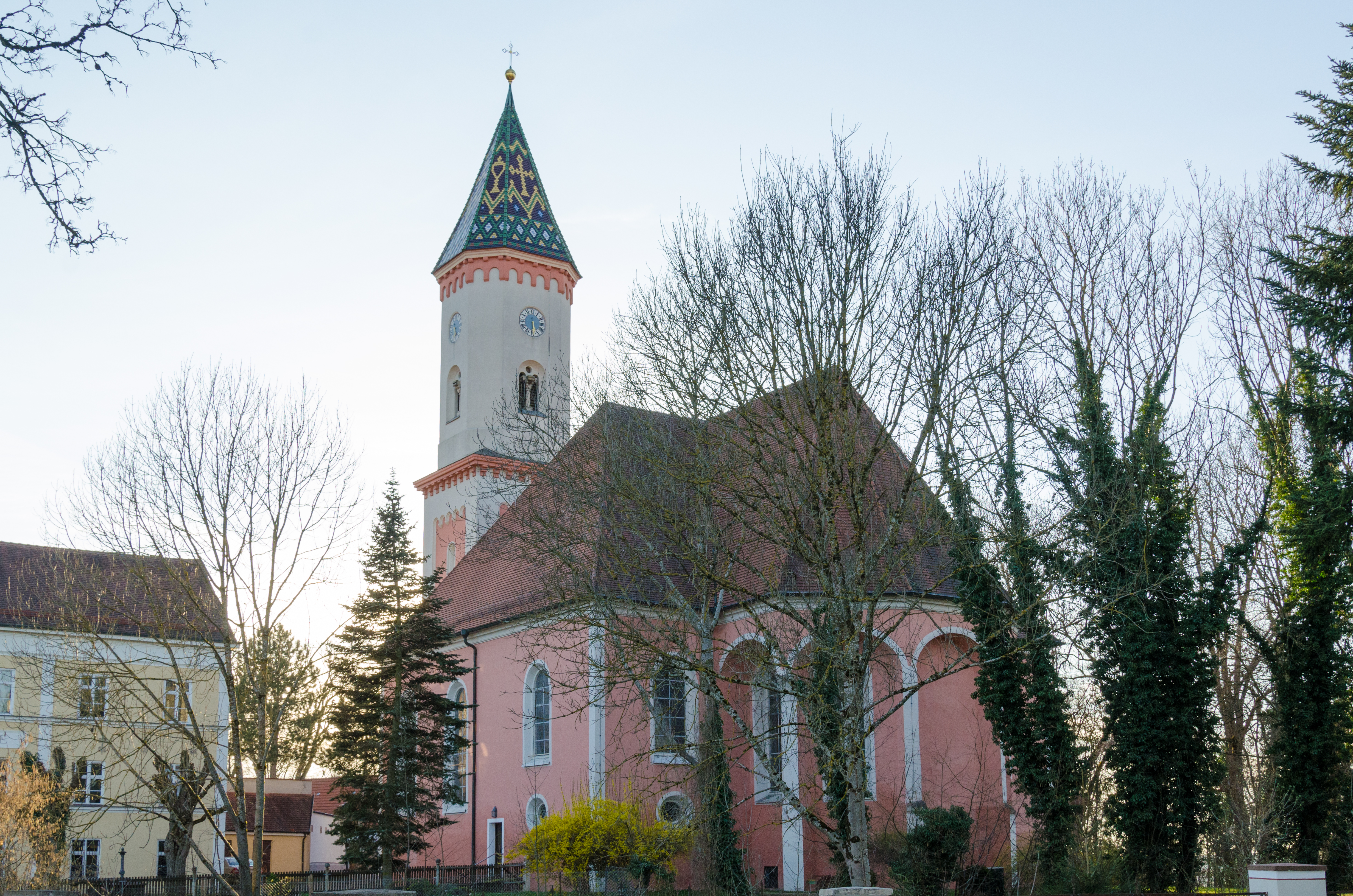 Altenstadt an der Iller, Kath. Illereichen, Pfarrkirche Mariae Himmelfahrt